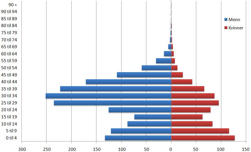 De Forente Arabiske Emiraters befolkningspyramide fra 1995 (per tusen)